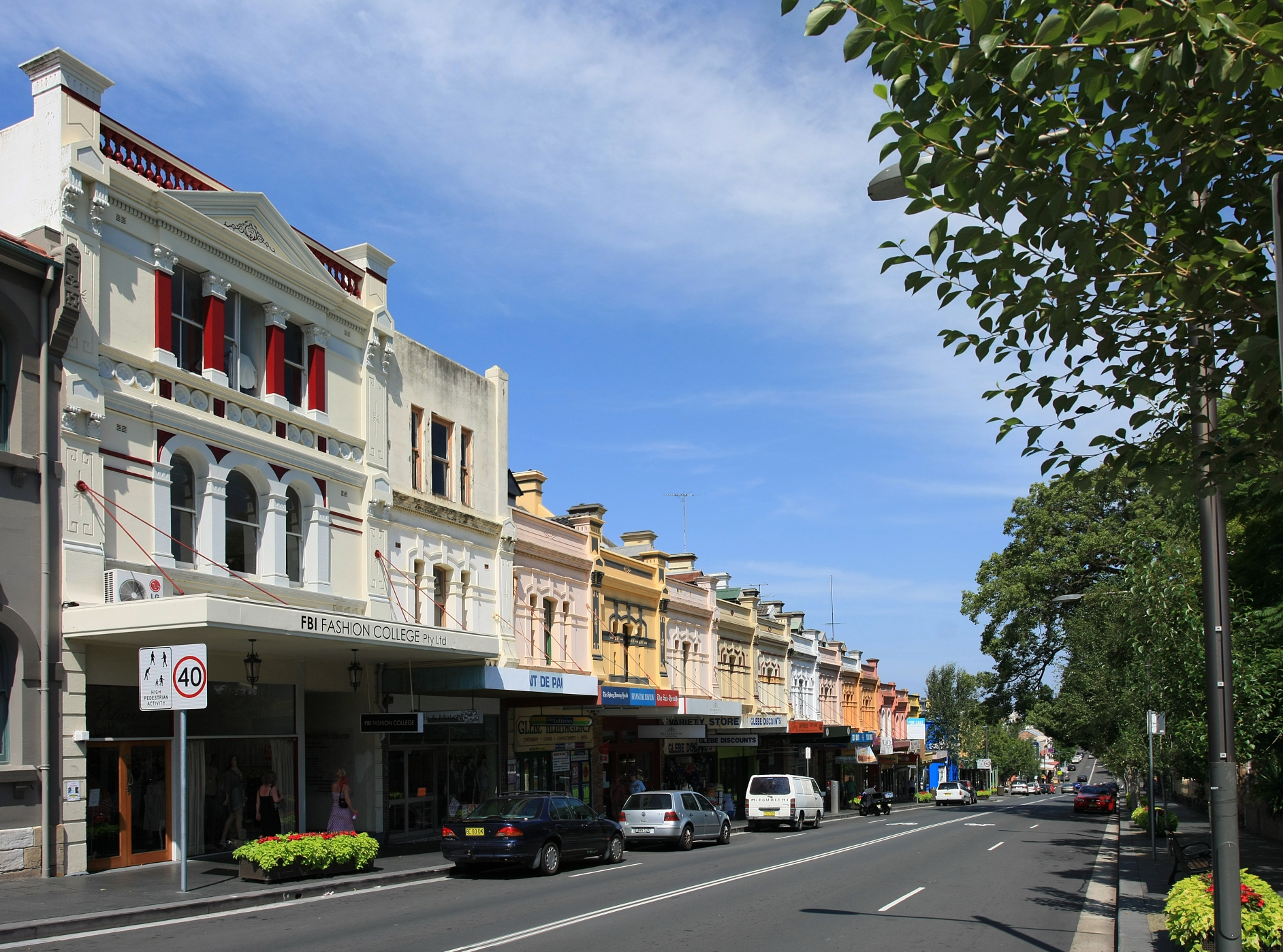 Glebe Point Road